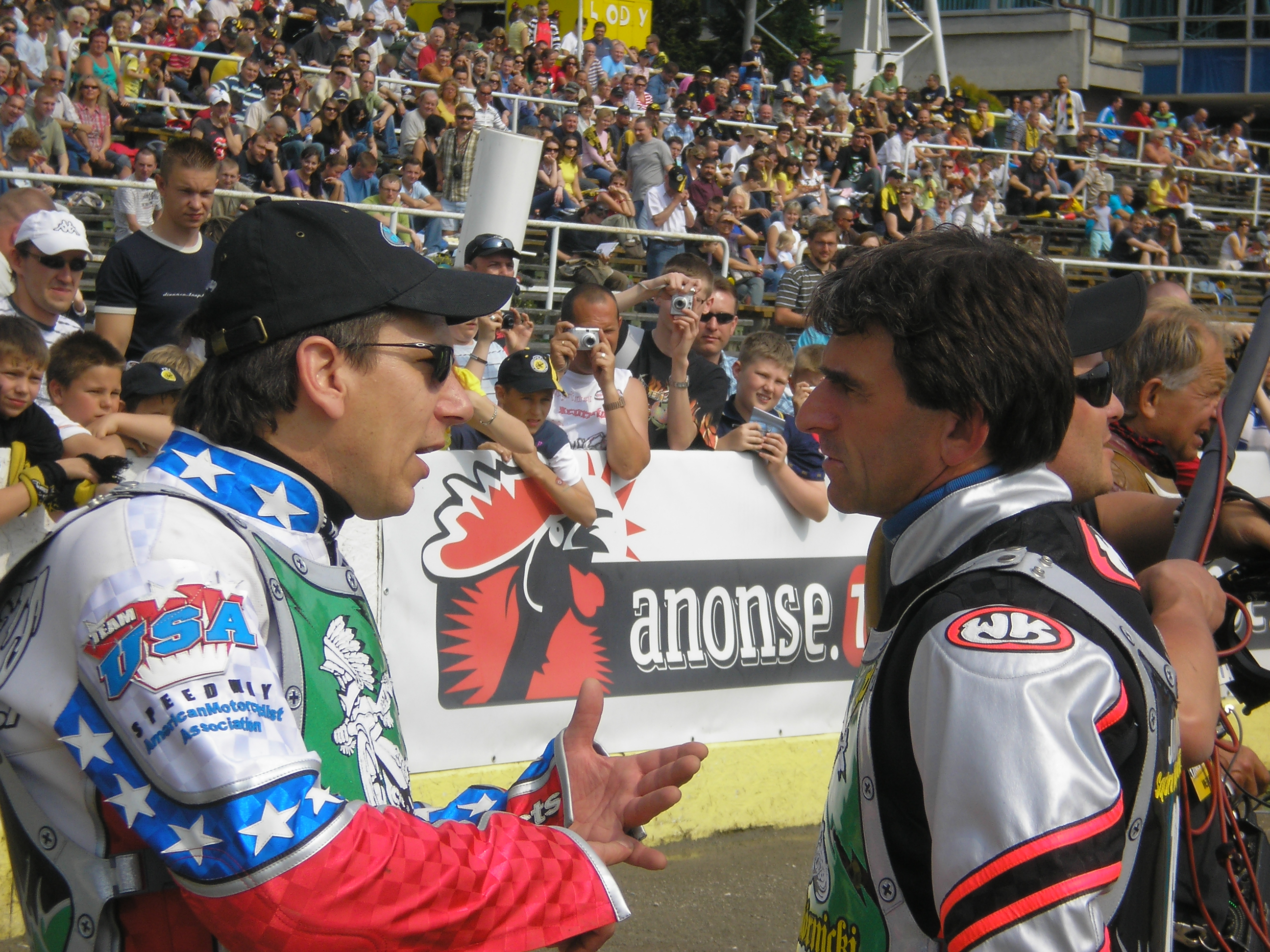 Sam Ermolenko (z lewej) i Roman Jankowski w Poznaniu - Turniej z okazji 15-lecia startów Adama Skórnickiego.